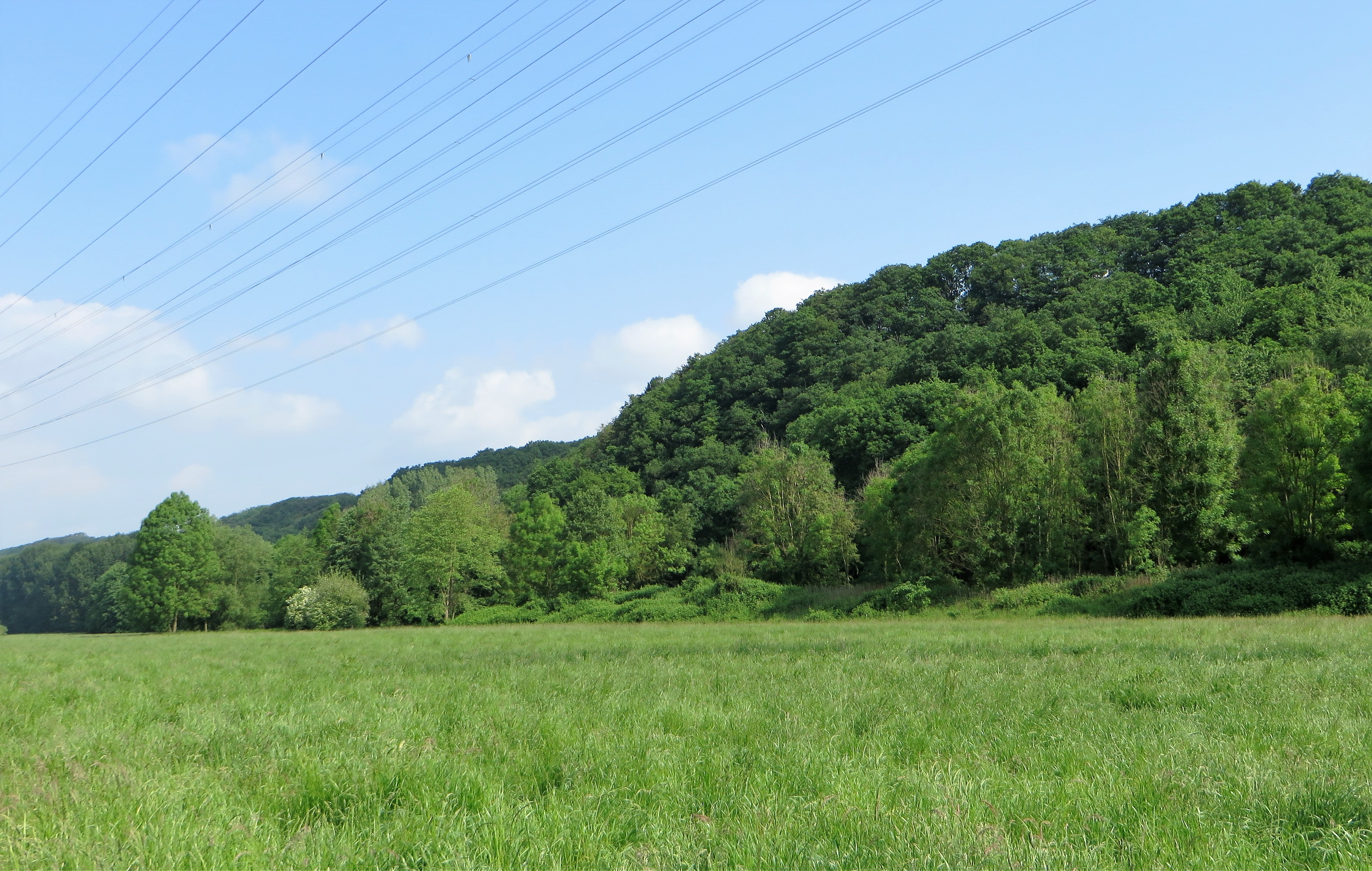 Naturschutzgebiet HA-007 „Lennesteilhang Garenfeld“ in Hagen-Garenfeld, zwischen Verbandsstraße und Garenfeld. Steilhang der Garenfelder Hauptterrasse gegen die Lenne mit z.T. tief eingeschnittenen Siepen mit ihren Quellmulden. Der Hang ist durchgängig mit weitgehend naturnahem Wald bedeckt und stellt den größten Hangwaldkomplex im Hagener Raum dar. Am Fuße der Hangterrasse haben sich die Abflüsse der Schichtquellen zu kleinen Teichen aufgestaut (Lennealtwässer).